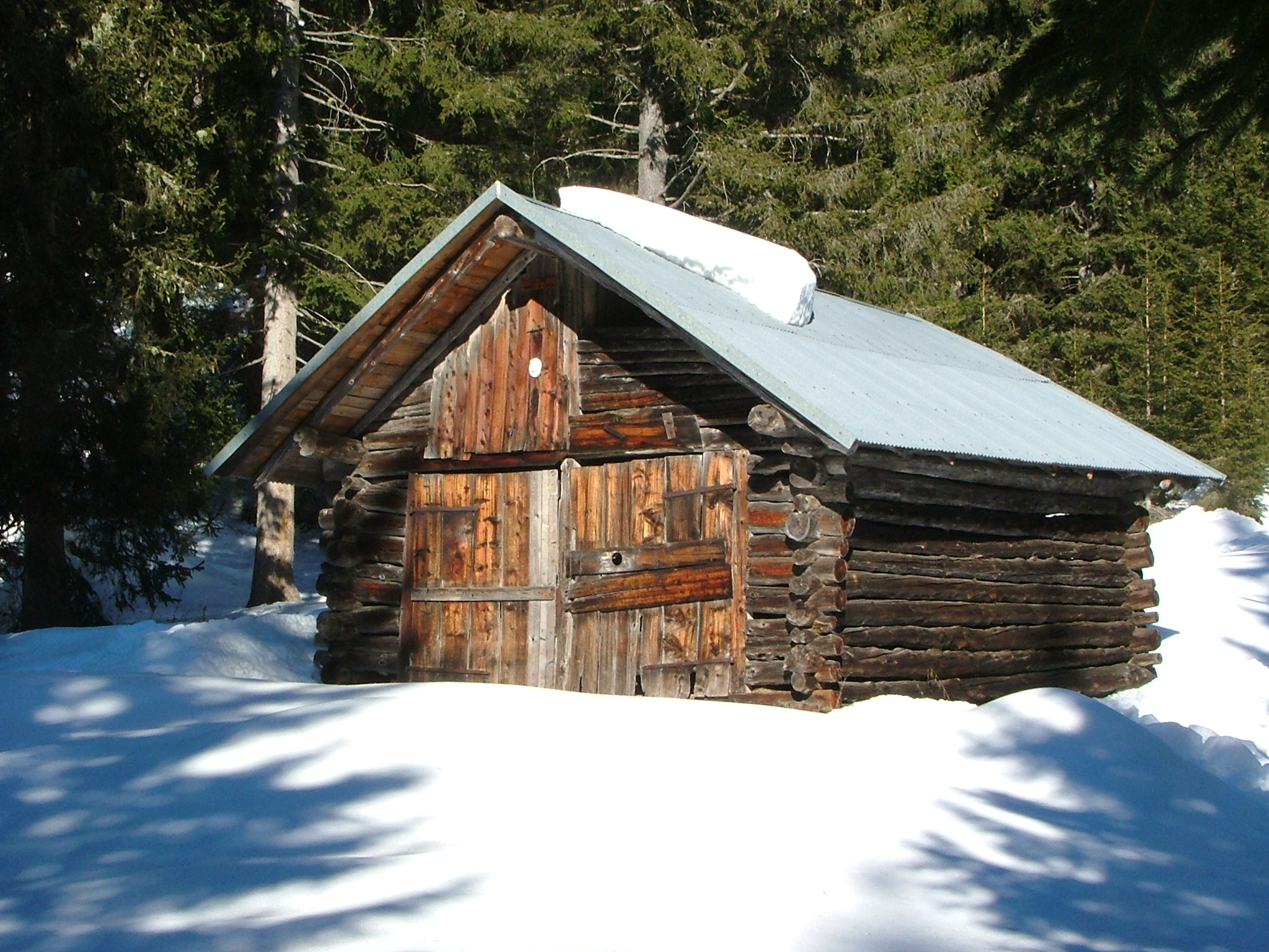 Fienile (tabià), pressi passo di Monte Zovo, Comelico Superiore, Belluno, Veneto, Dolomites, Italy